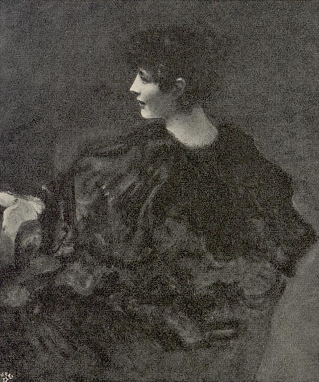 Max Koner: Fräulein Trippenbach (Anna Muthesius), 1895